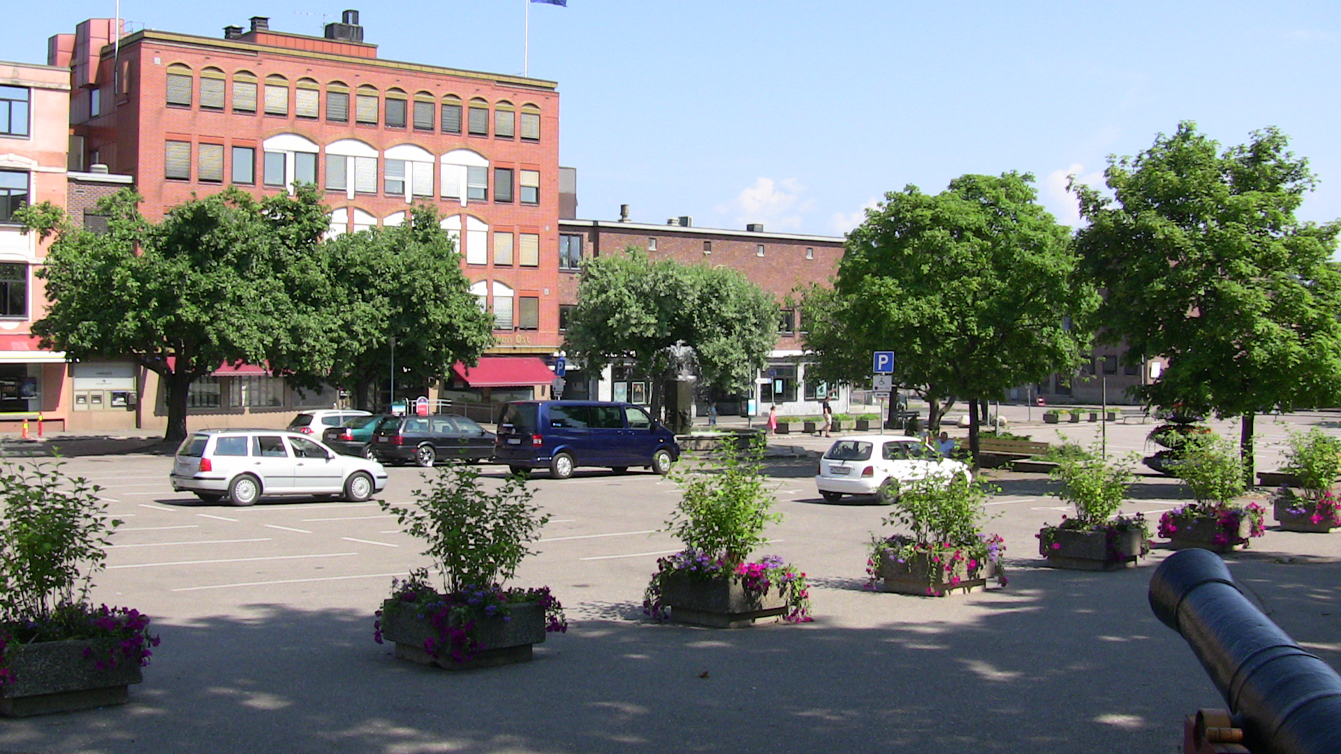 Horten market, Horten, Vestfold, Norway